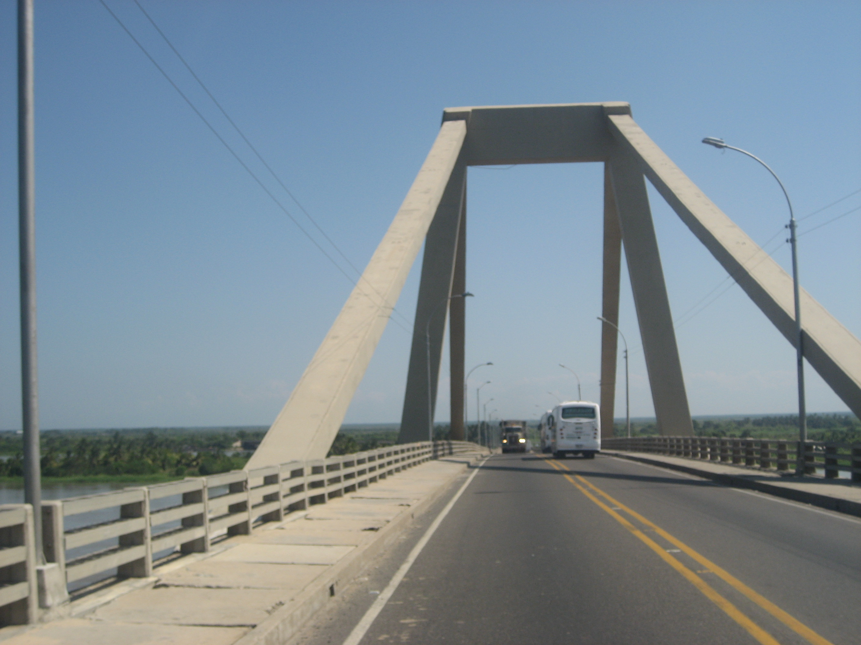 Image of Barranquilla bridge over magdalena river, Colombia